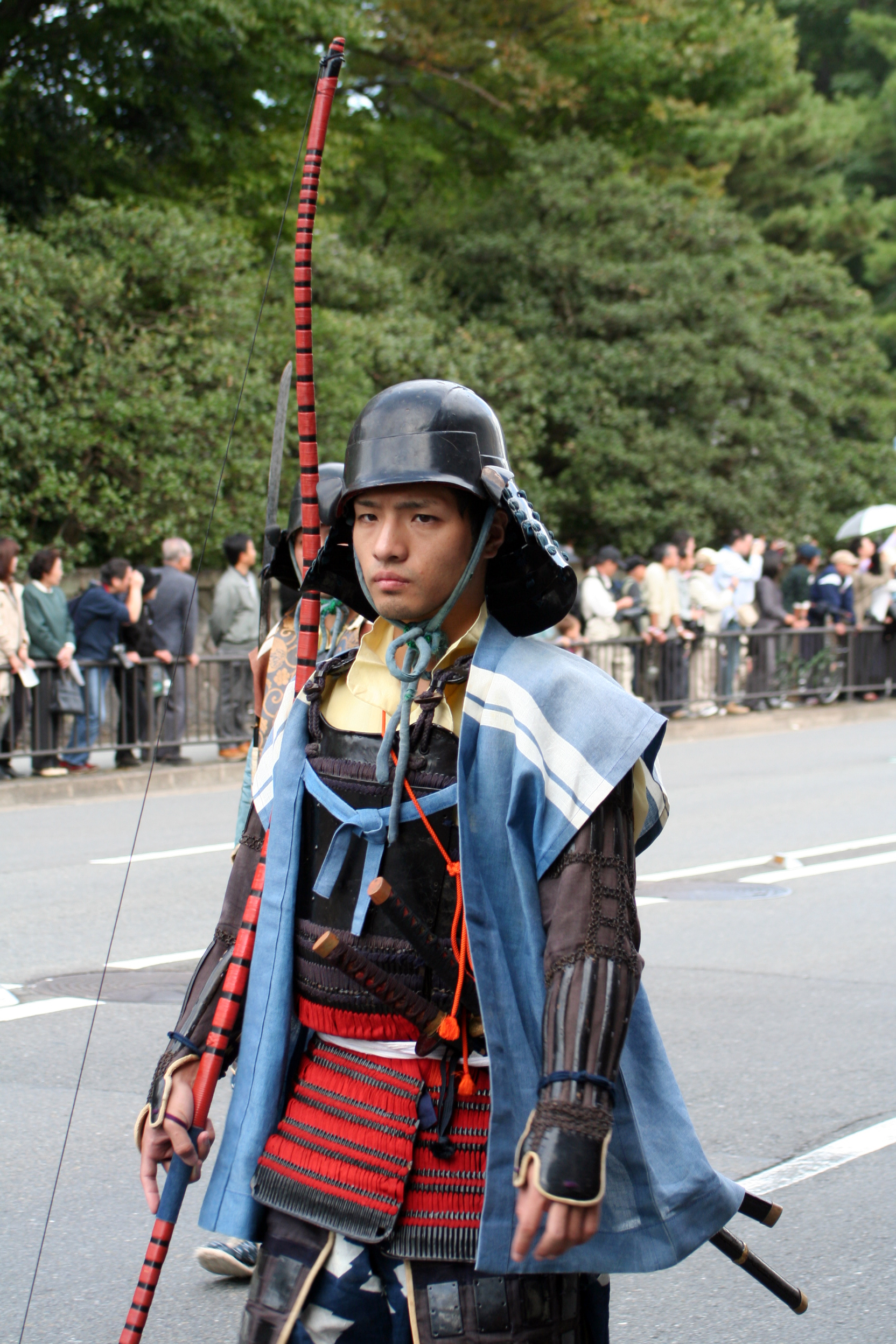 京都府京都市にて開催された時代祭。正午の御所から平安神宮までの行進の様子。2009年10月22日撮影。